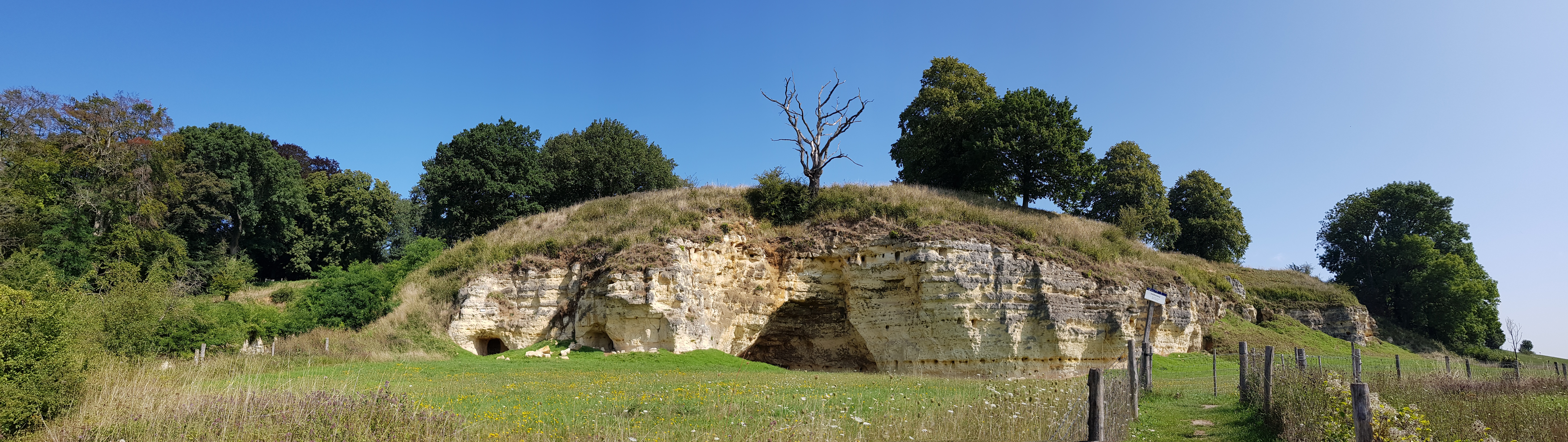 Däölkesberg, Oud-Valkenburg, Valkenburg aan de Geul, Nederland